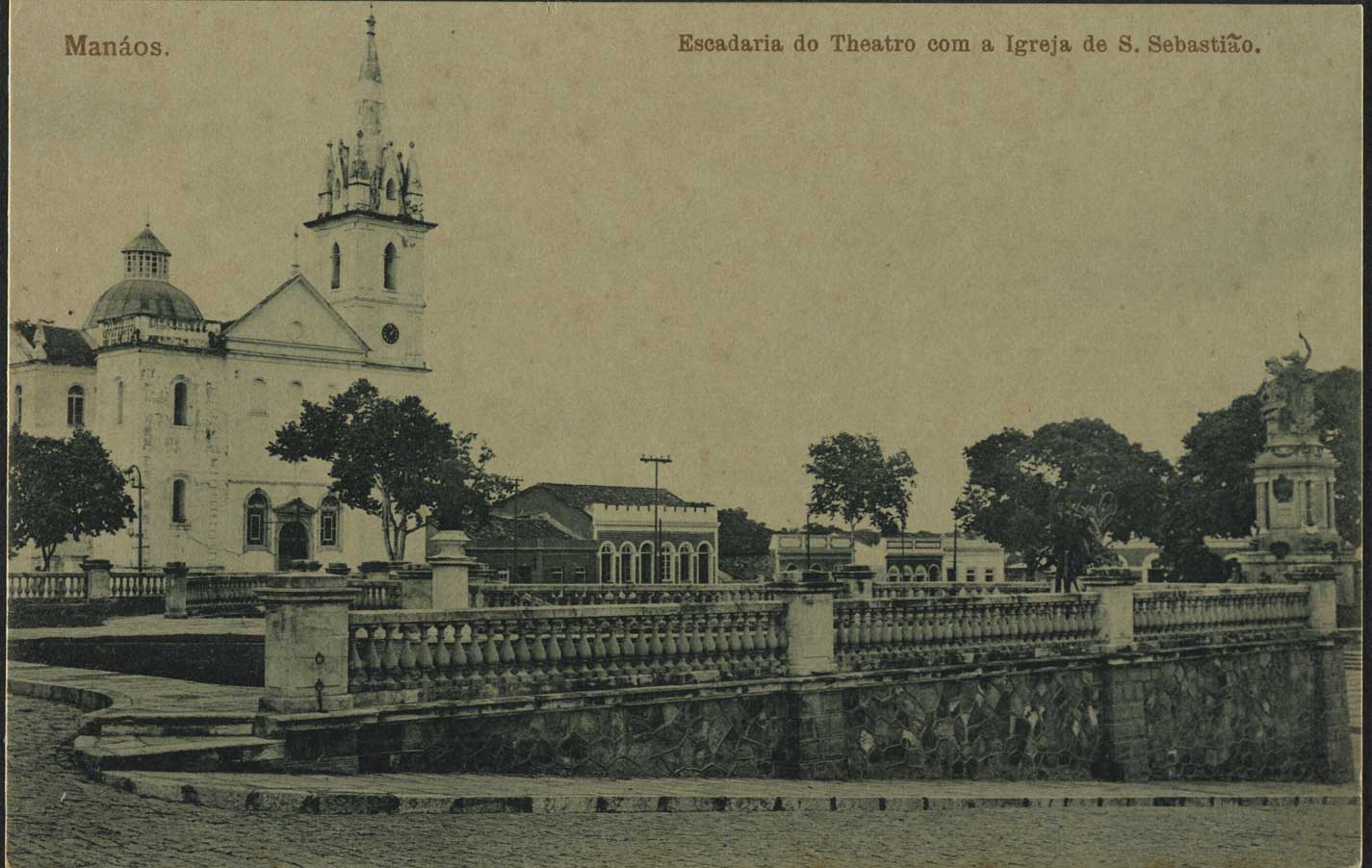 Igreja de São Sebastião em Manaus, Brasil, no ano de 1909.